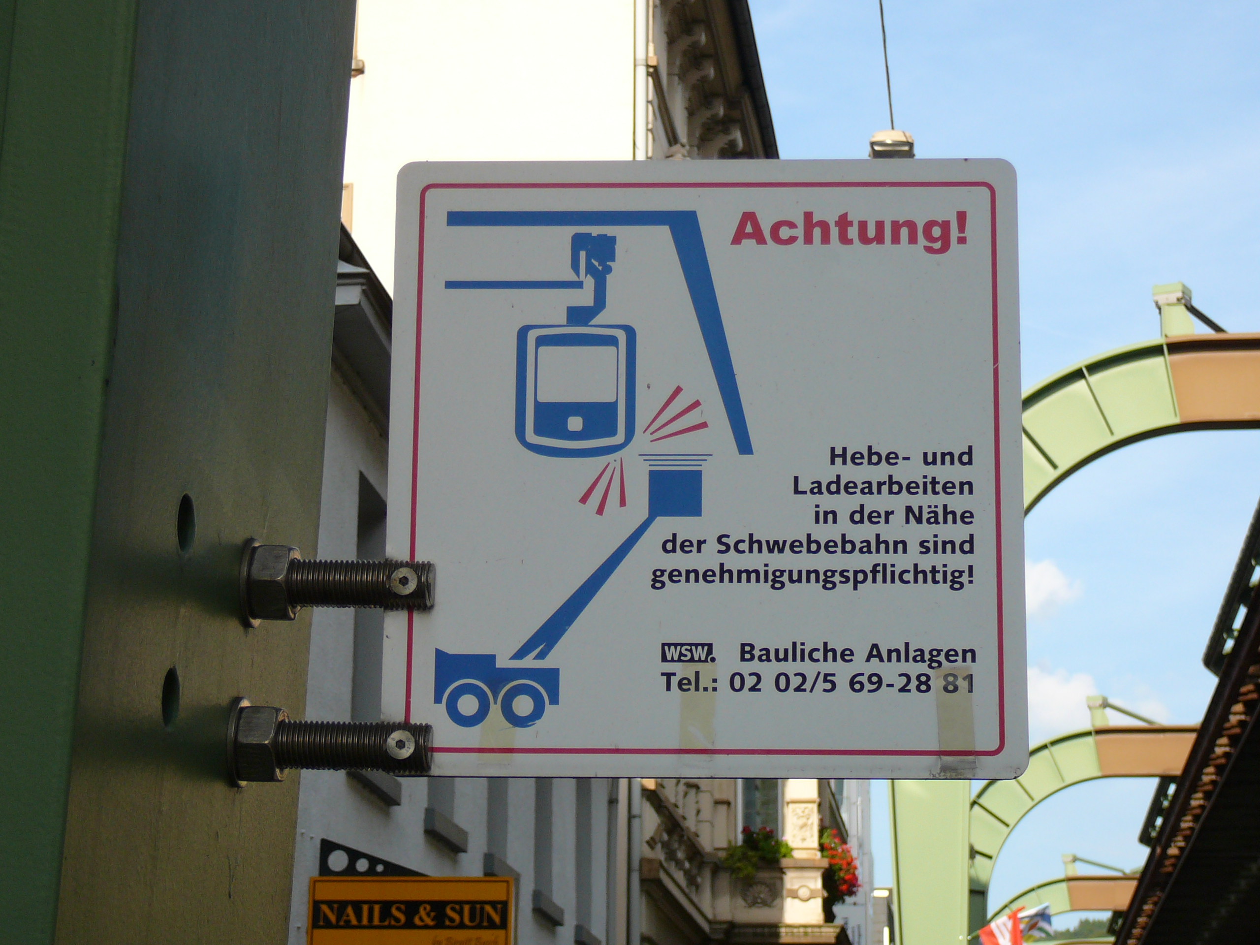 Schild am Schwebebahngerüst an der Sonnborner Straße, Wuppertal